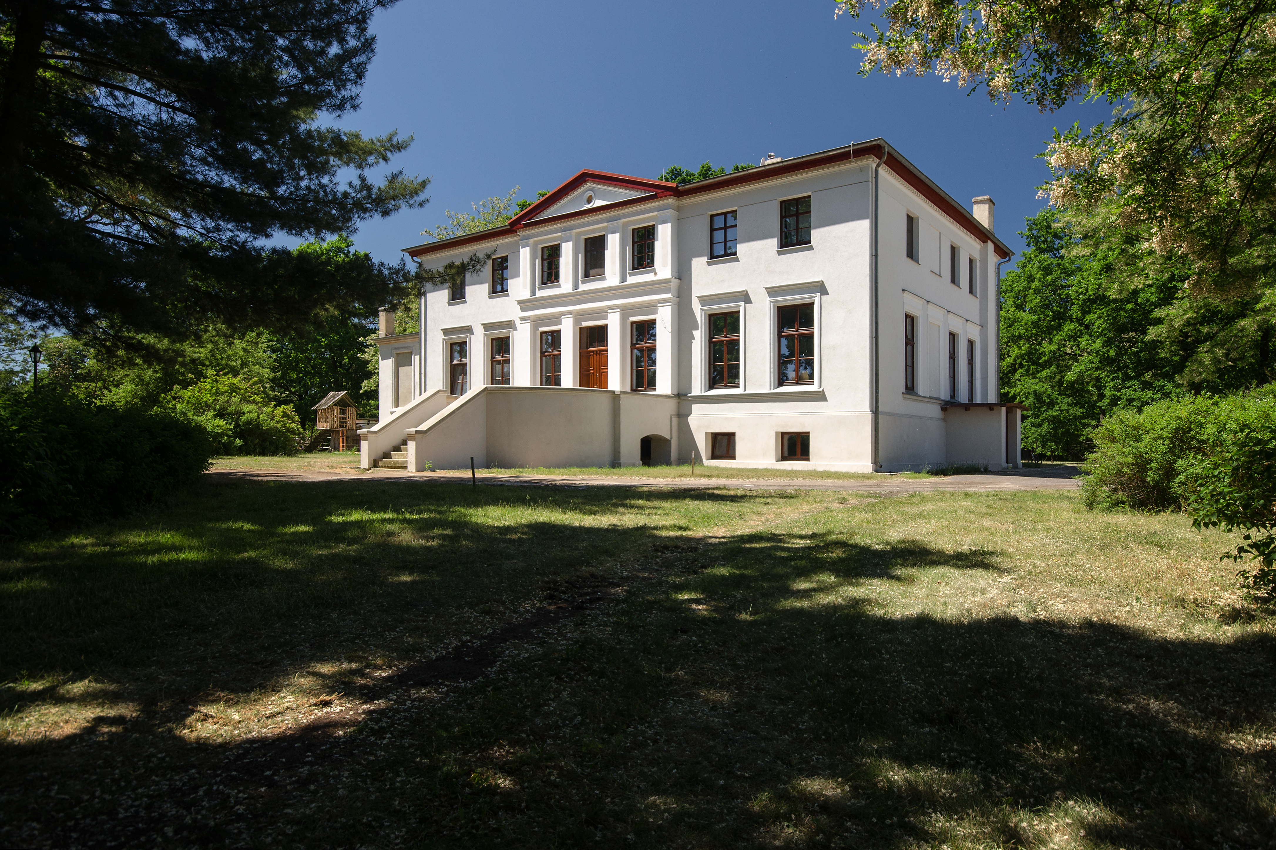 Kietlów 13, dwór, 2 poł. XIX